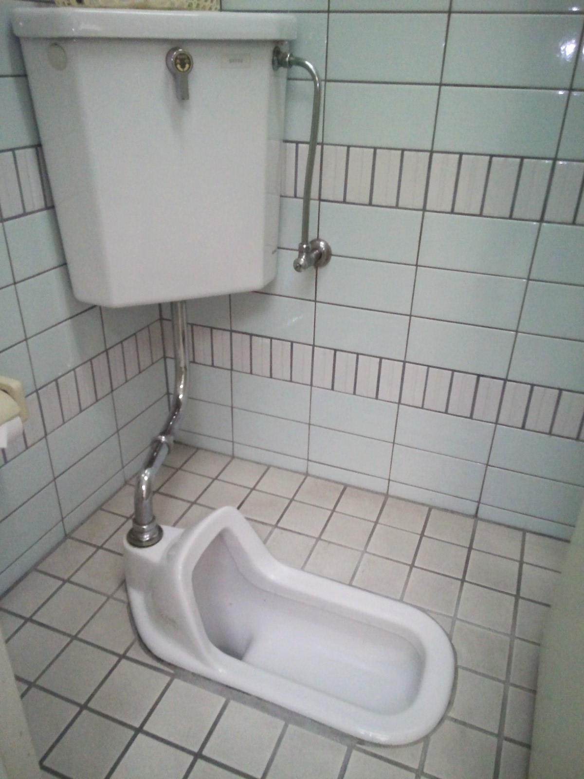 TOTO C750V+S570